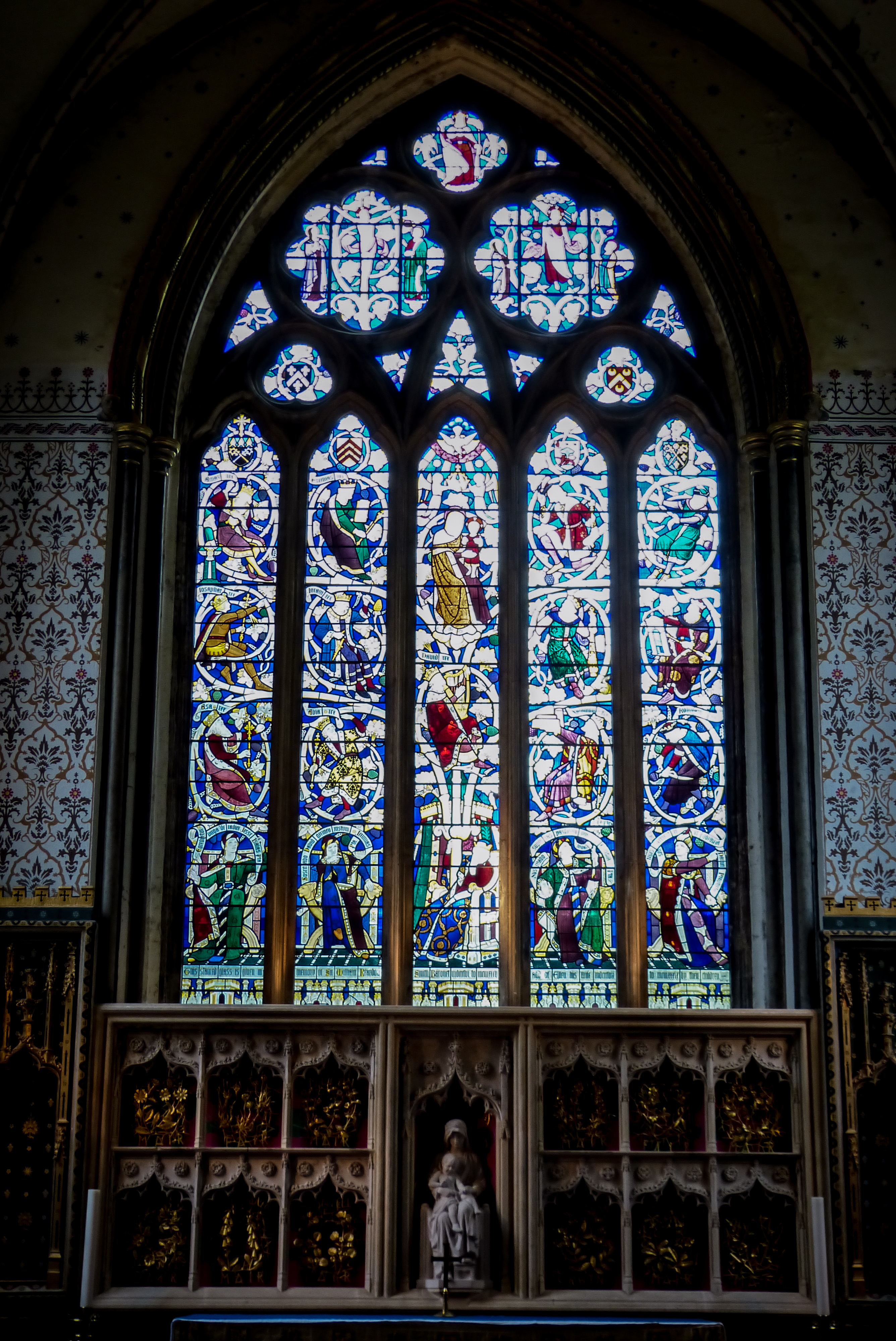 Llandaff Cathedral